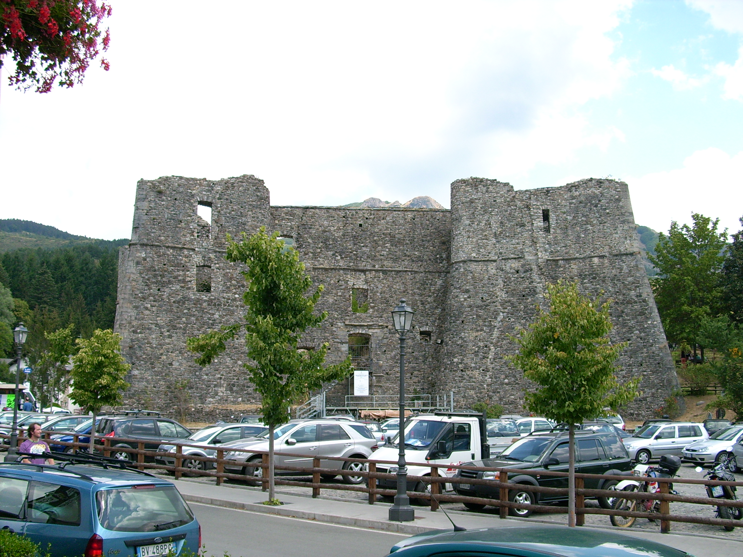 Castello dei Malaspina, dei Fieschi e dei Doria presso Santo Stefano d'Aveto, Liguria, Italia